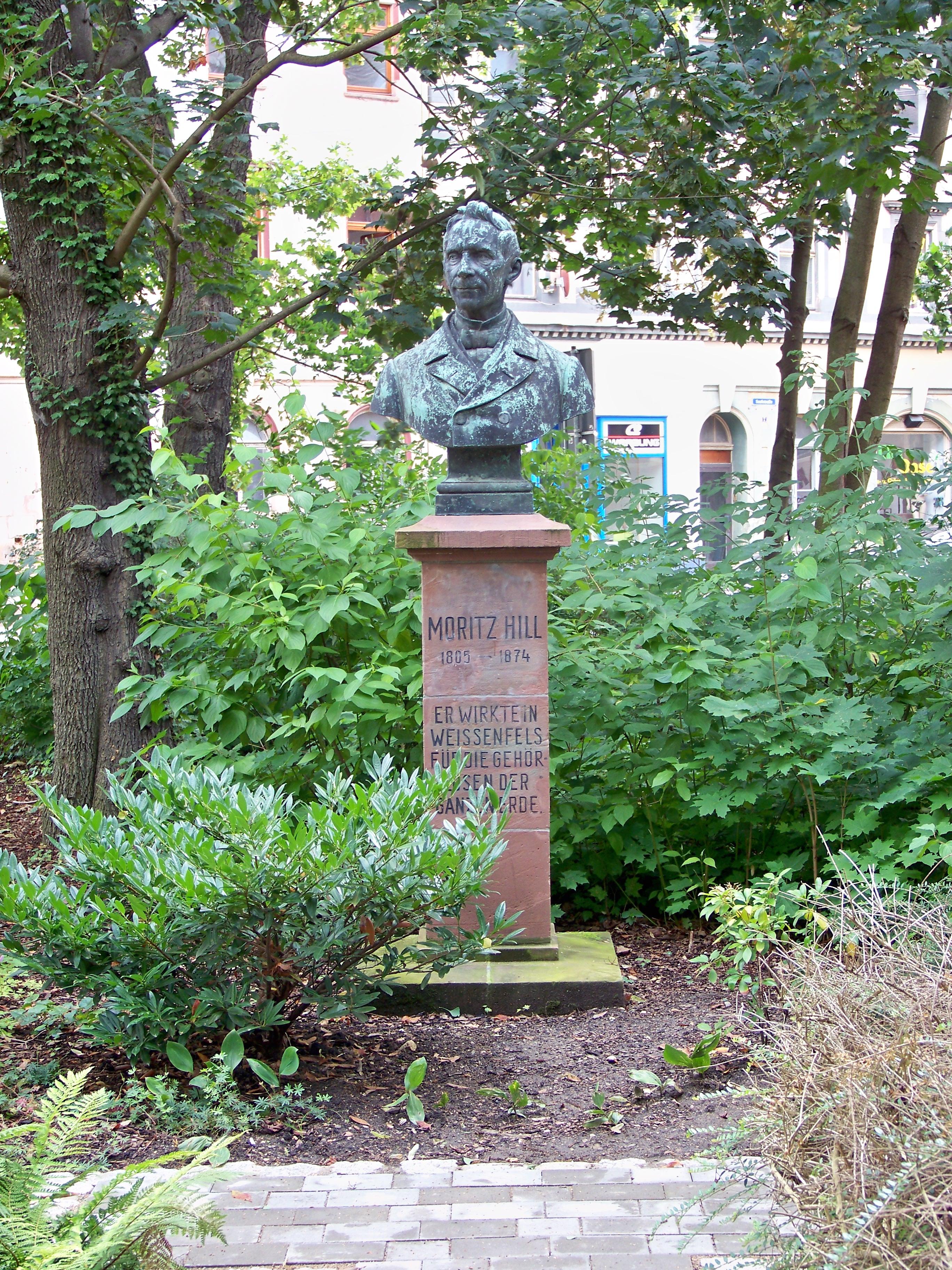 Denkmal zu Ehren Moritz Hills (1805-1874) in Weißenfels